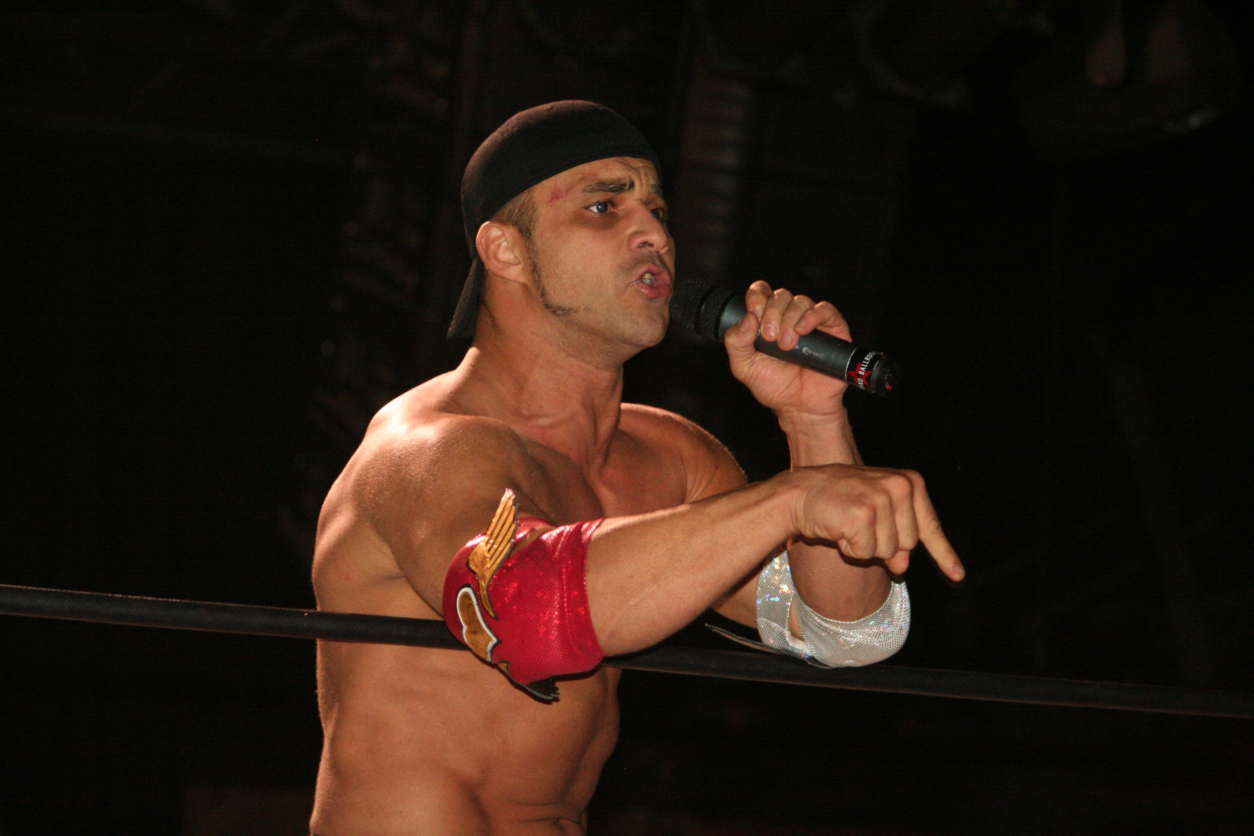 Teddy Hart